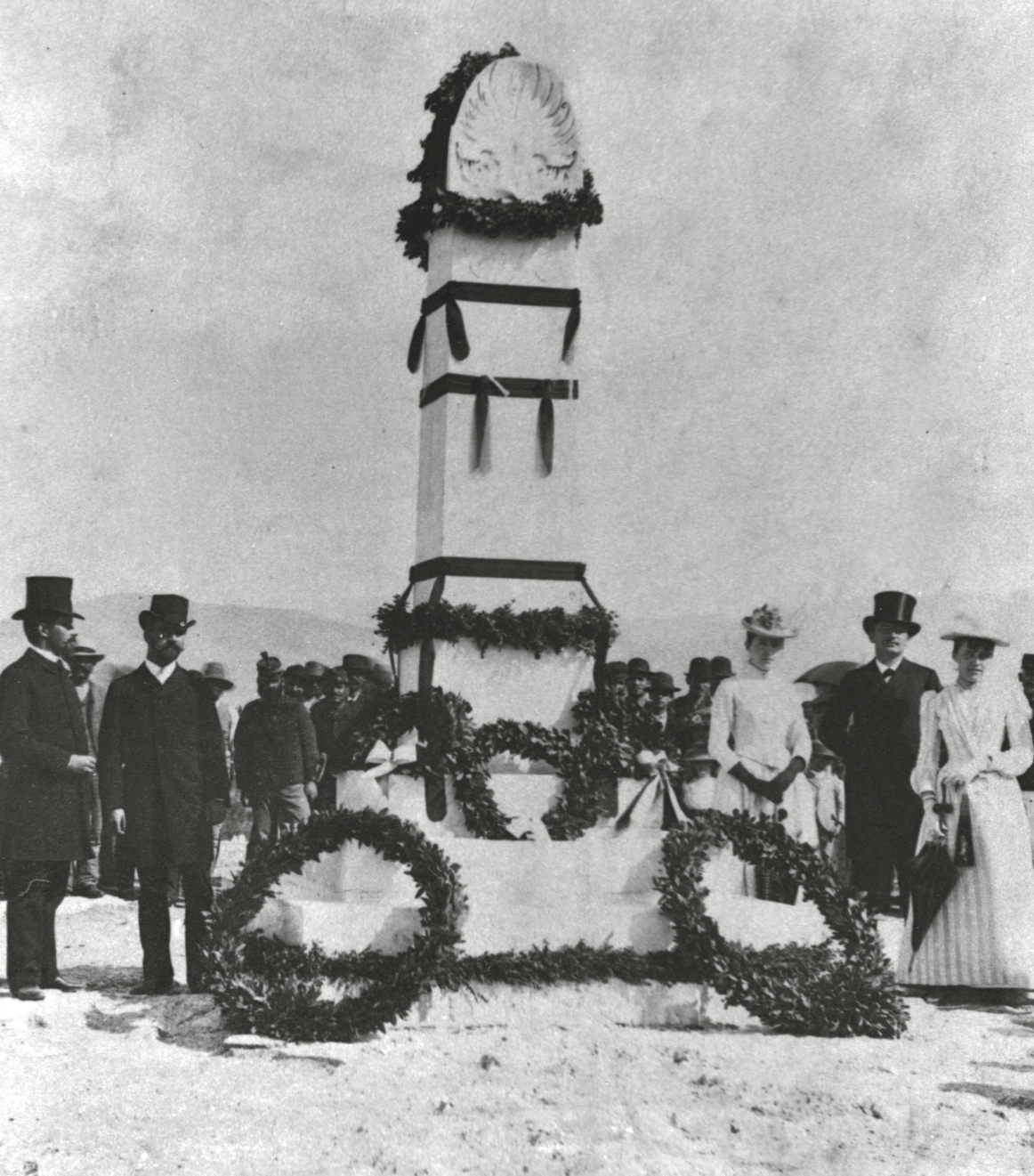 Gedenkfeier für den Altertumsforschers Karl Otfried Müller (1797–1840) zu dessen 50. Todestag 1890 in Athen.